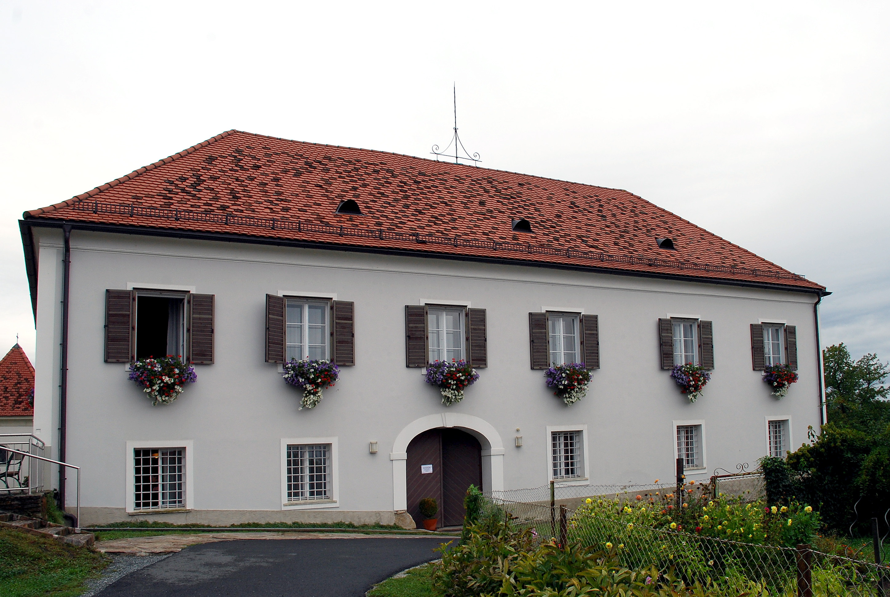 Pfarrhof St Stefan ob Stainz, Steiermark, Österreich: Object location46° 55′ 47.85″ N, 15° 15′ 20.8″ E